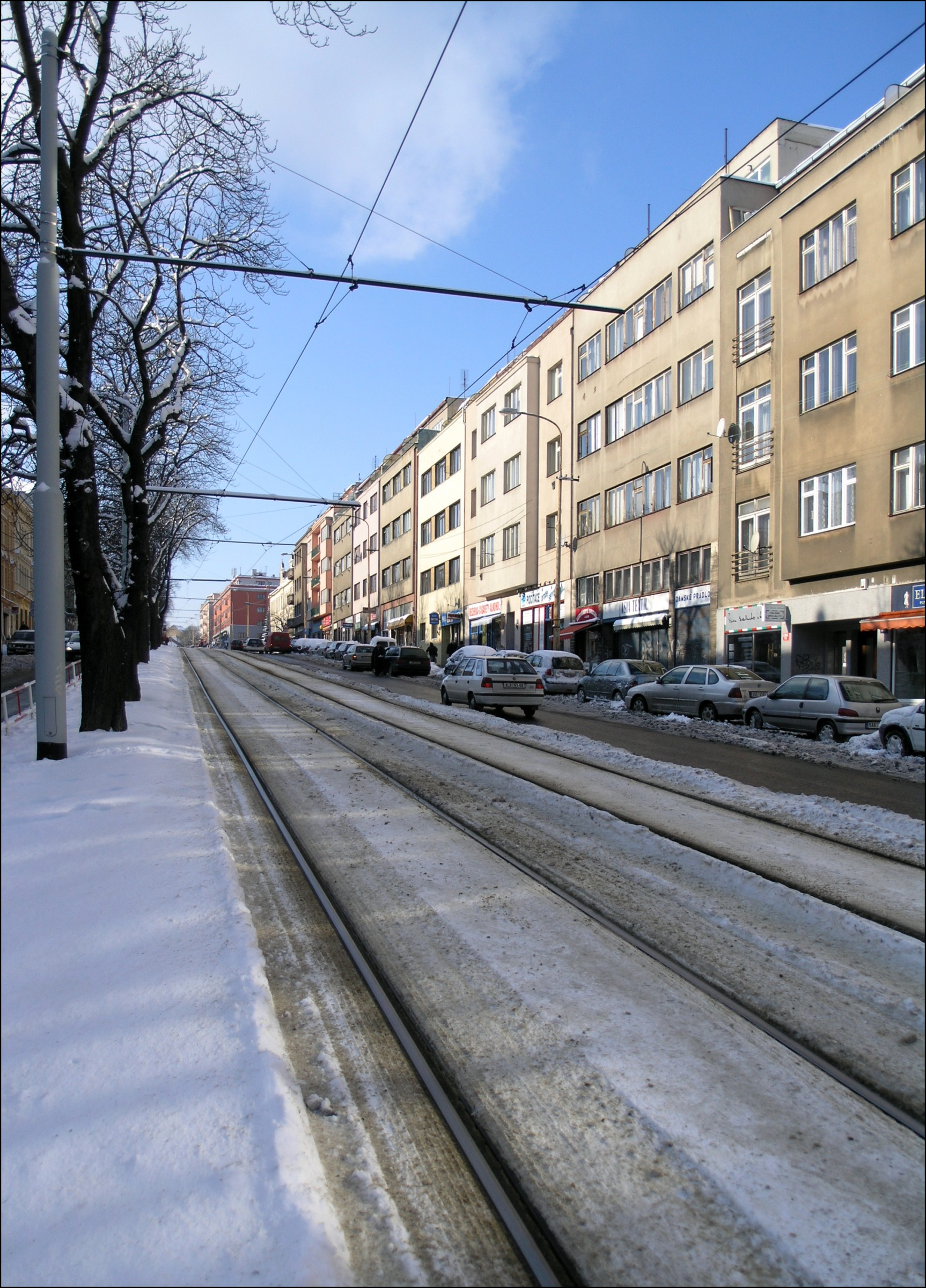 Bělohorská, jedna z hlavních ulic Břevnova